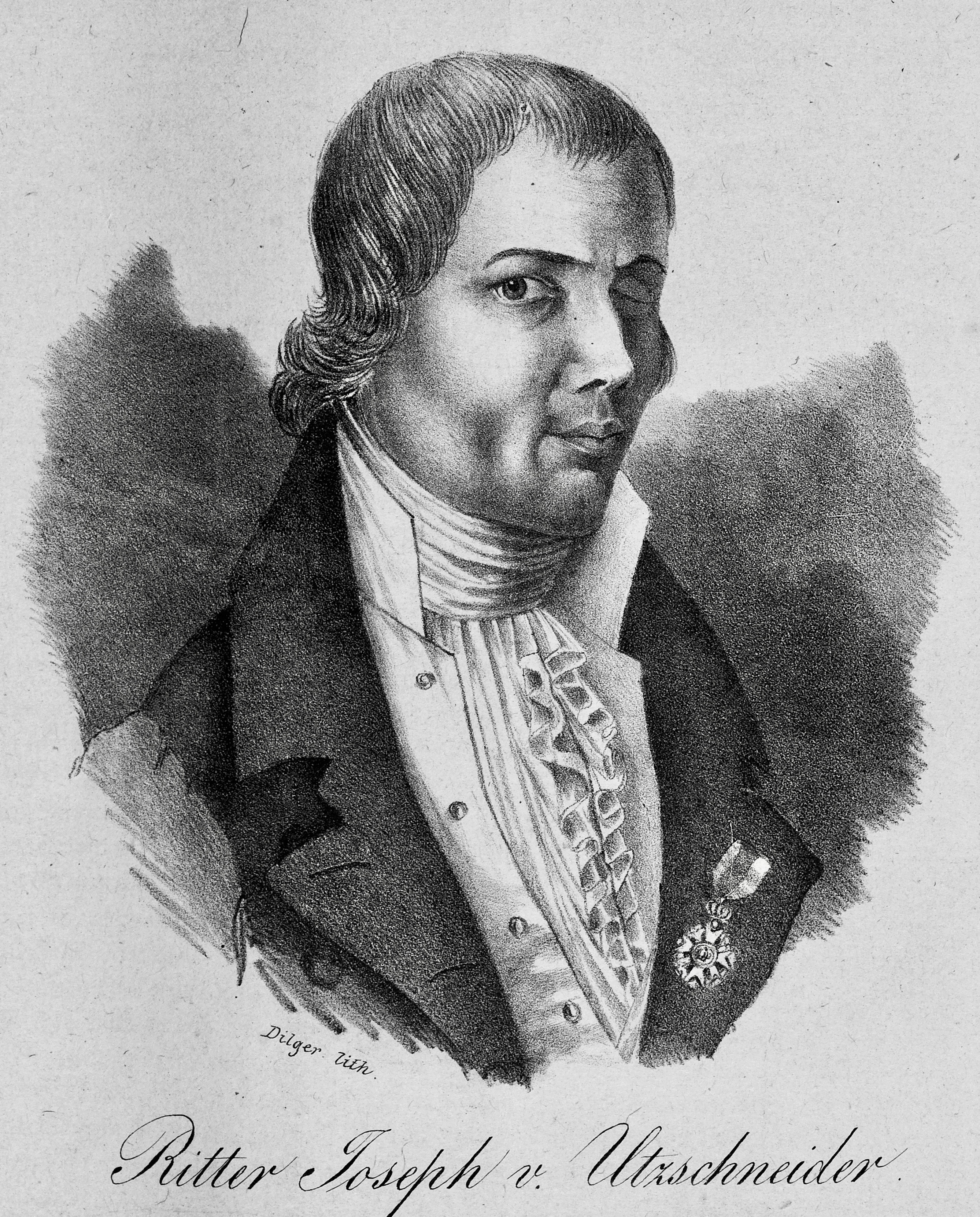 Johann Baptist Dilger (1814–1847): Joseph von Utzschneider (1763–1840), bayerischer Politiker und Unternehmer, Finanzberater von Kurfürstin Maria Leopoldine von Österreich-Este, 1805–1818 Besitzer des säkularisierten Klosters Benediktbeuern, Förderer des Optikers Joseph Fraunhofer, 1808 nobilitiert, 1818–1823 Bürgermeister von München, verlor als Knabe ein Auge. Lithografie.